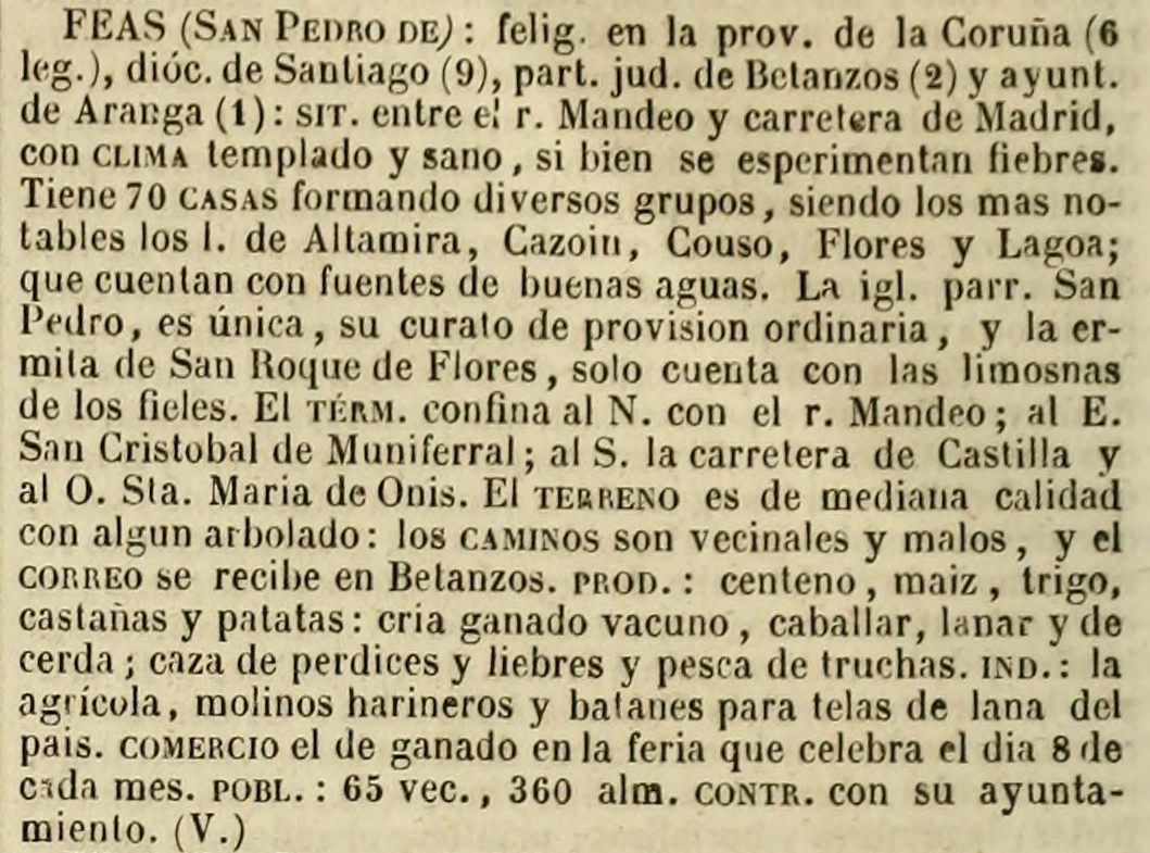 Feás no Diccionario geográfico-estadístico-histórico de España y sus posesiones de Ultramar.